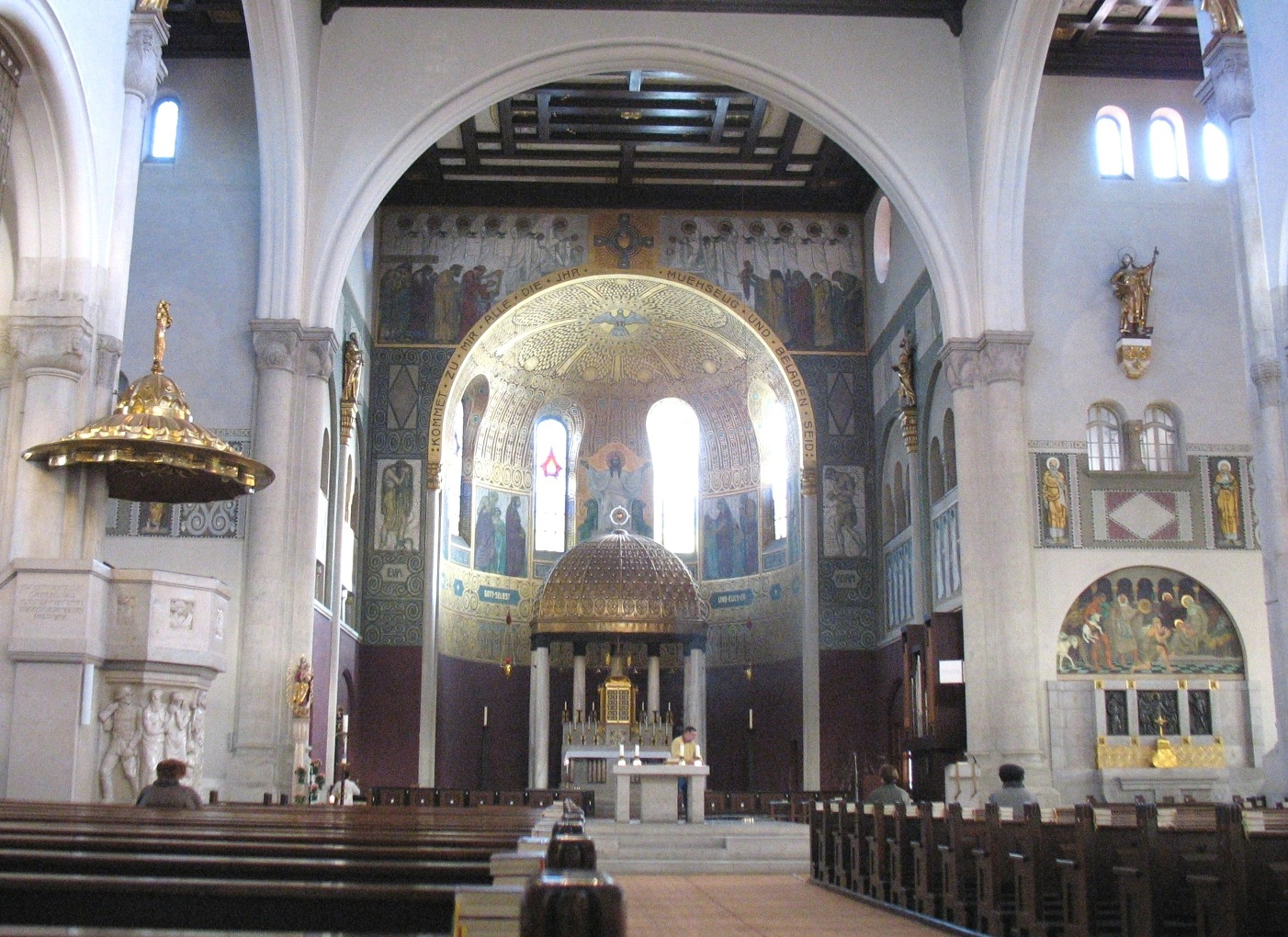 Stadtpfarrkirche Herz-Jesu Augsburg, Stadtteil Pfersee